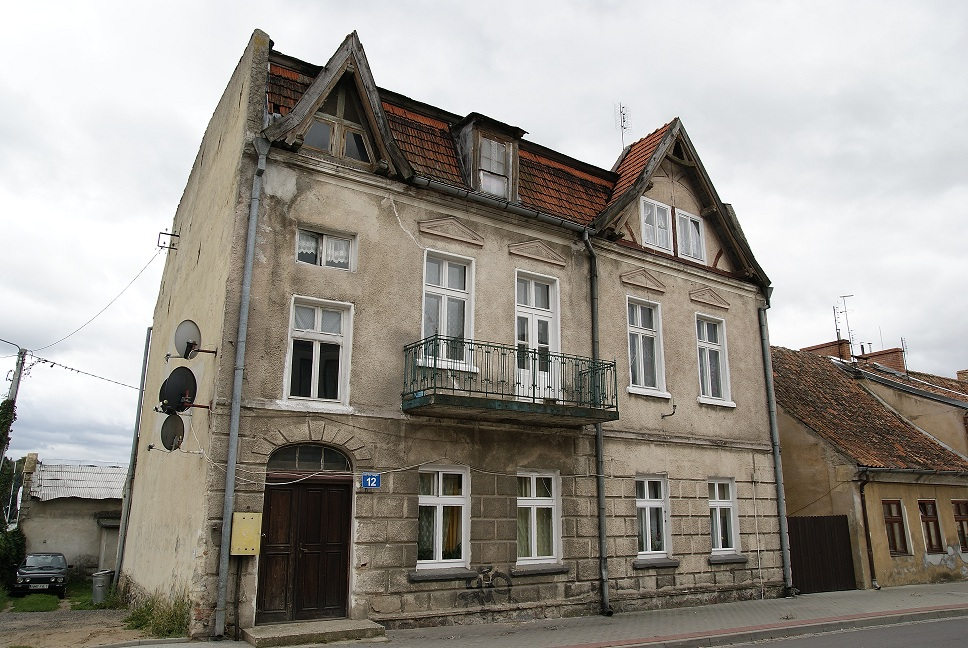 budynek mieszkalny Mikołajki, ul. Kajki 12, Mikołajki (miasto)